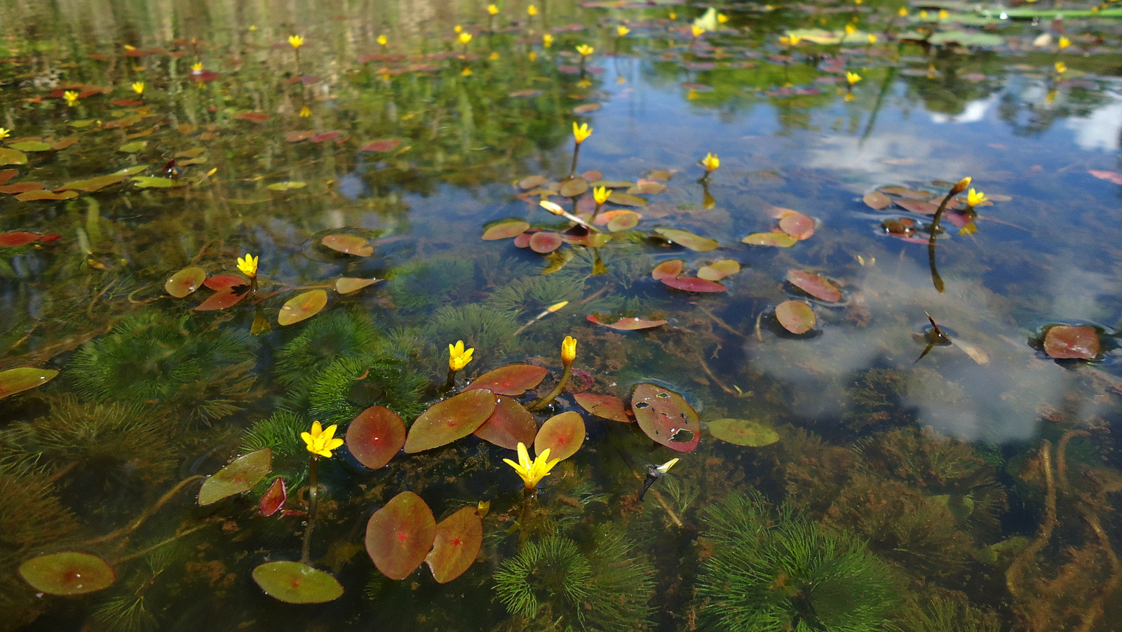 Cabomba aquatica Aubl.